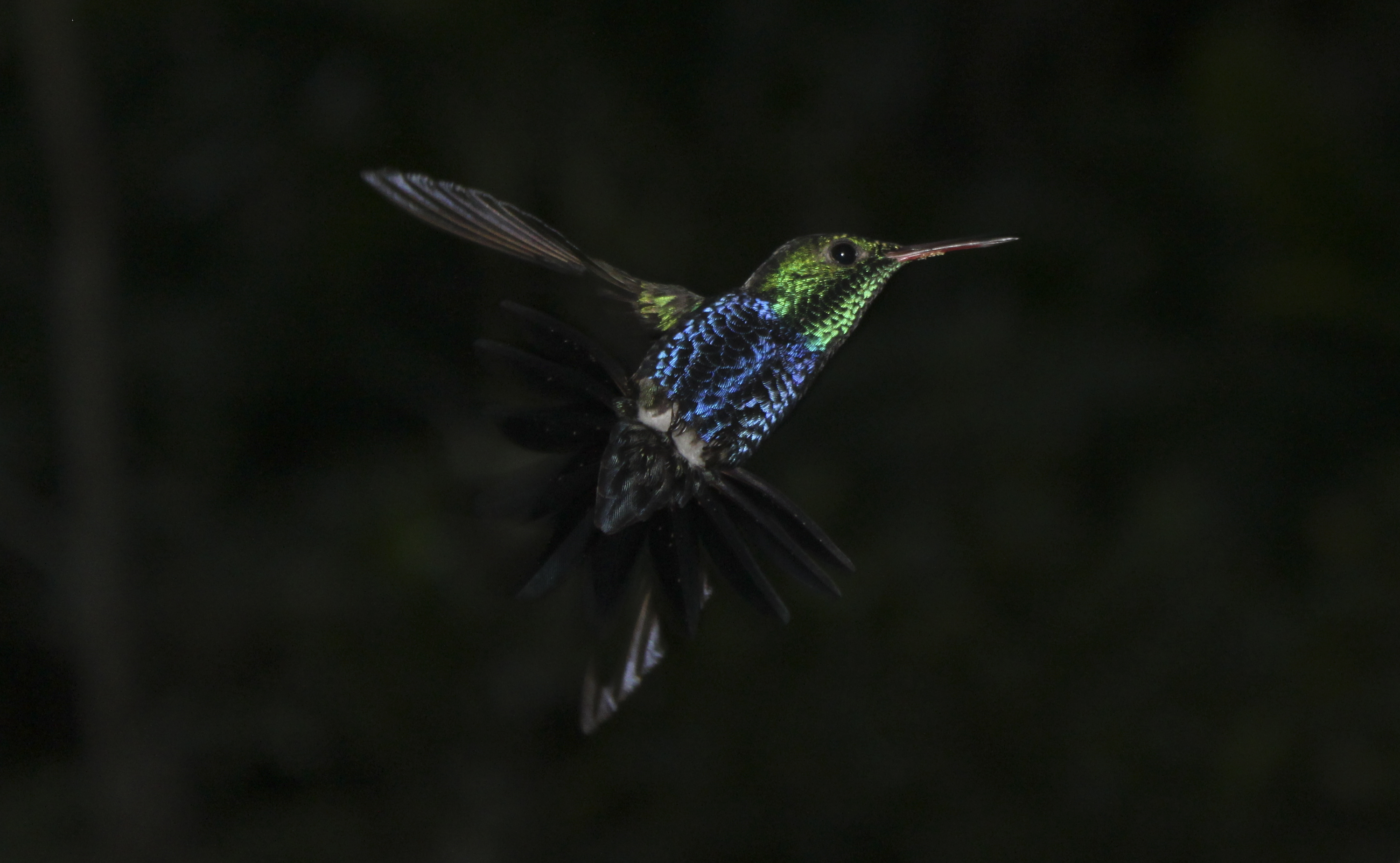 Violet-bellied Hummingbird (Damophila julie).